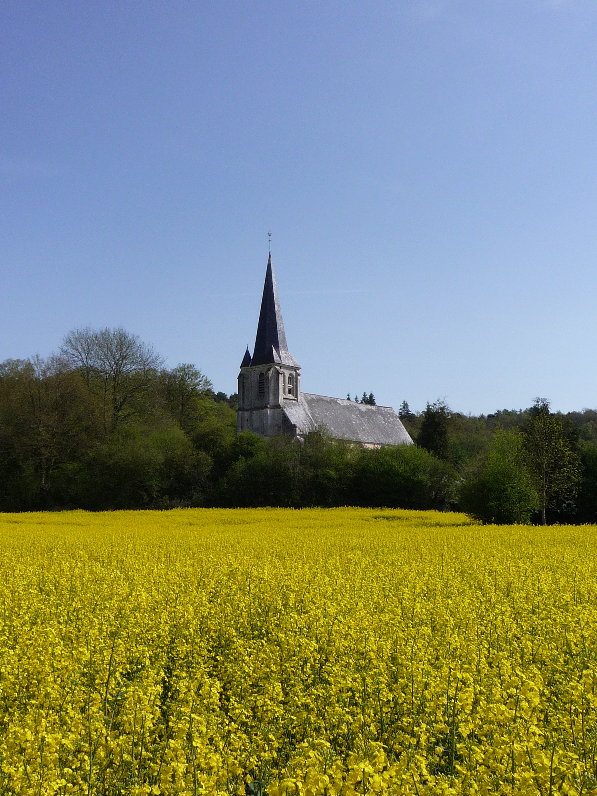 Eglise d'Ecaquelon